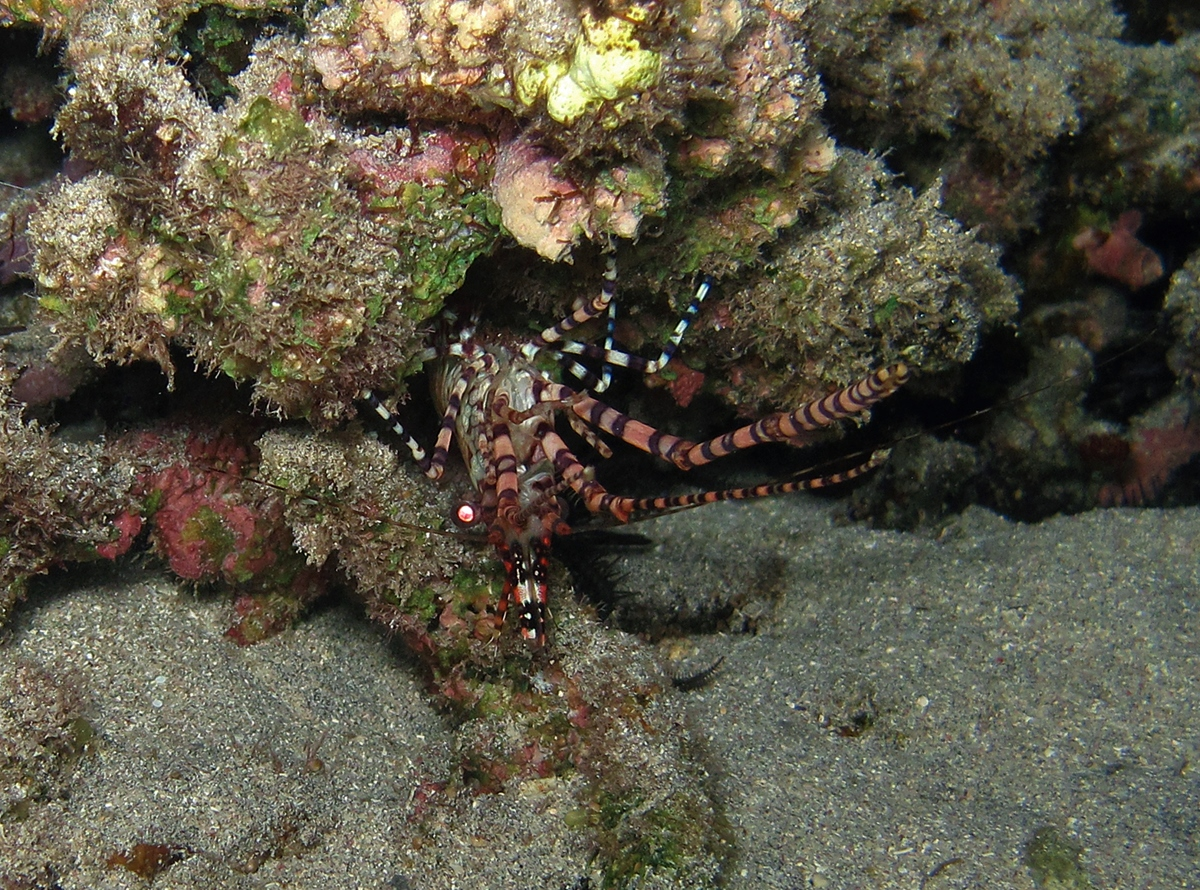 Une crevette marbrée (Saron marmoratus) mâle, de nuit à la Réunion.